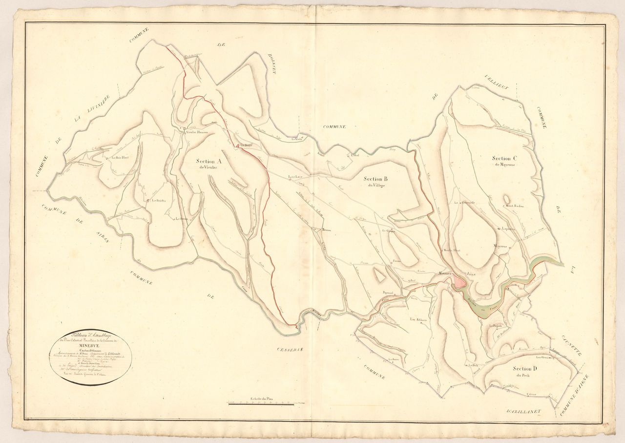 Minerve. - Cadastre napoléonien : tableau d'assemblage (1817)